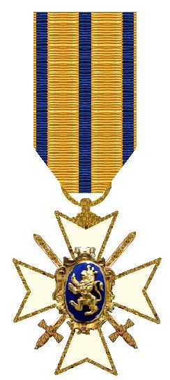 Kruis IIe Klasse